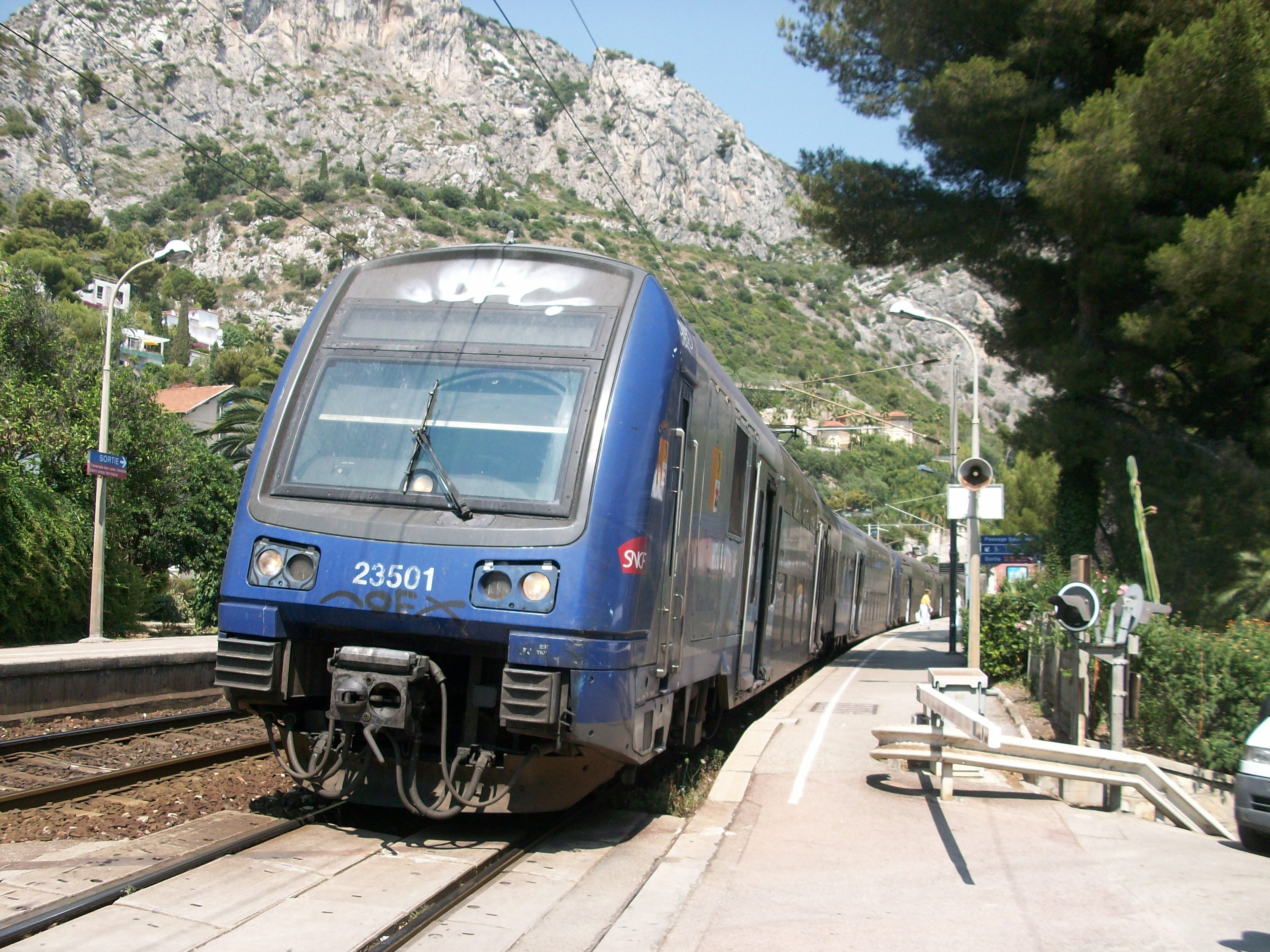 Z 23500 sur un TER PACA